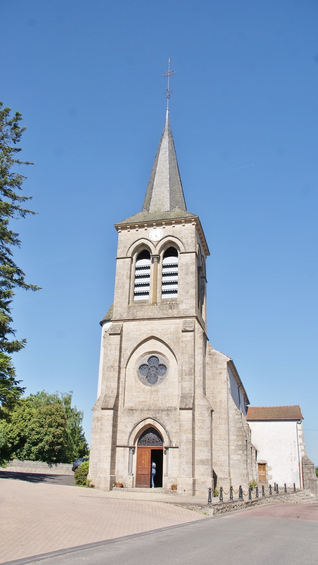 Façade occidentale de l'église Saint-Pardoux de Villosanges (63).